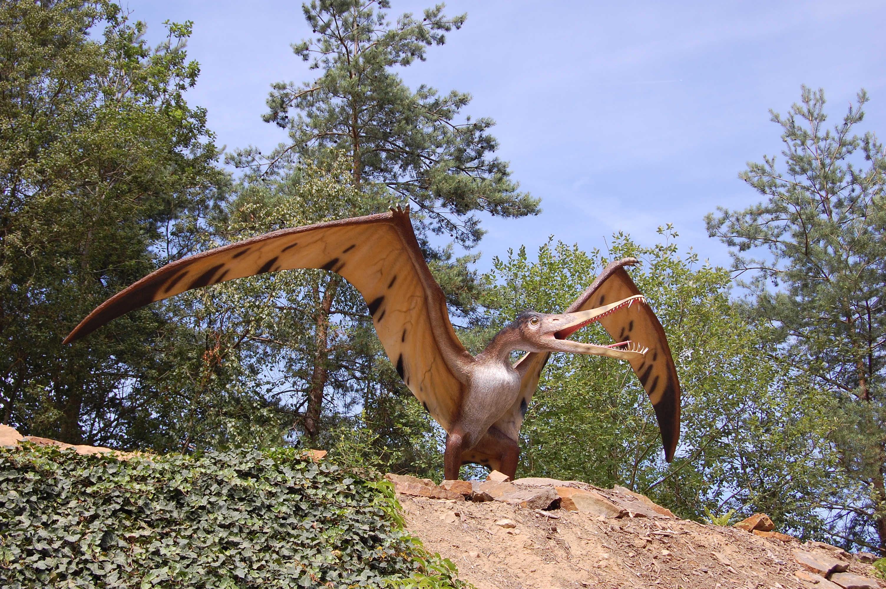 ( 9 ) KREIDE vor 110 Mio. Jahre vor unserer Zeit --- Eine Verbreiterung an der Spitze des Kiefers nutzte Cearadactylus um schlüpfrige Fiche festzuhalten. Die Zähne griffen bei geschlosenem Maul ineinander. Fischfresser - Flügelspannweite 4 m - Gewicht 11 kg Raw image - free for creative commons - a link back would be nice:)